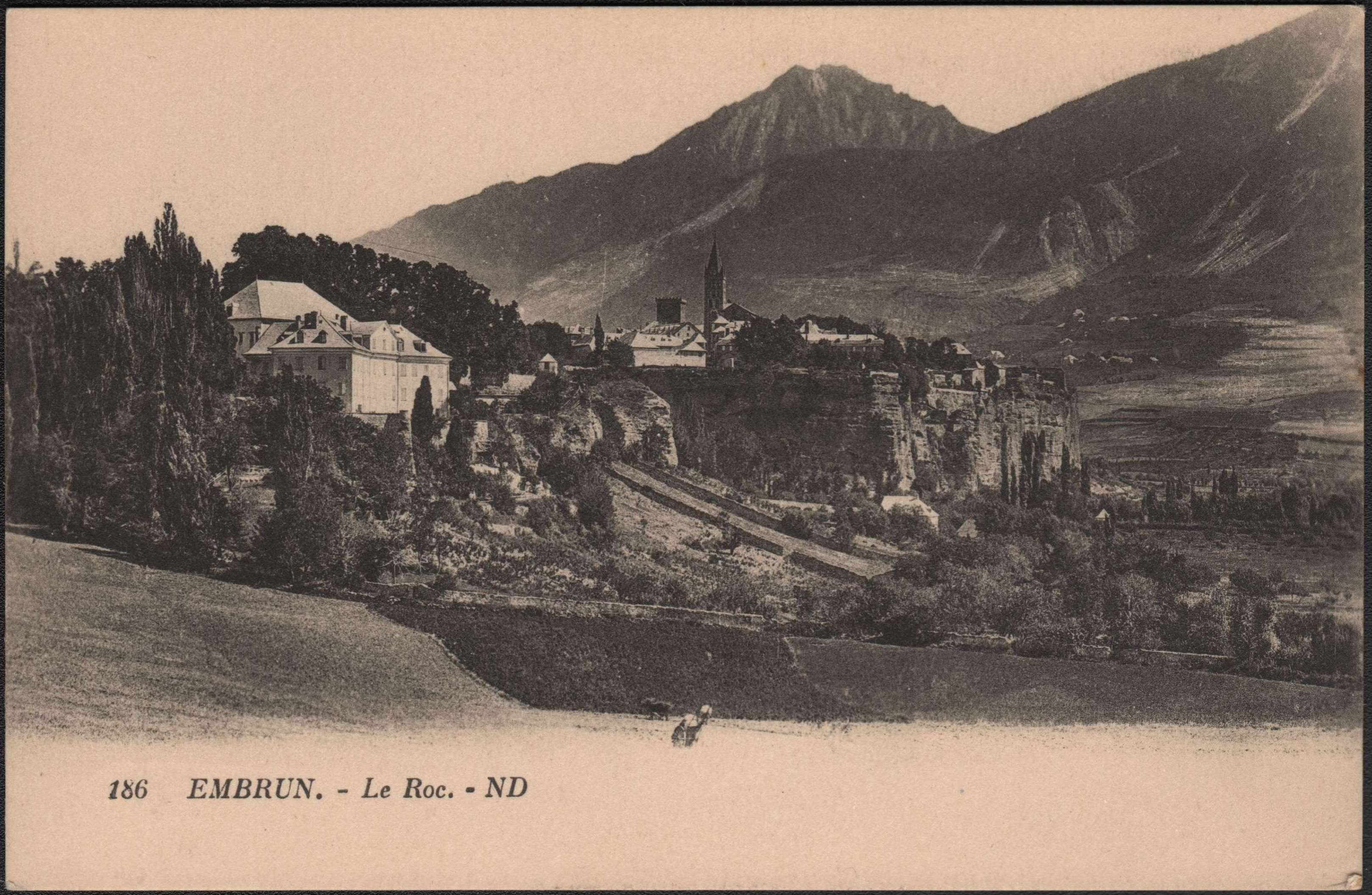 186 Embrun - Le Roc.